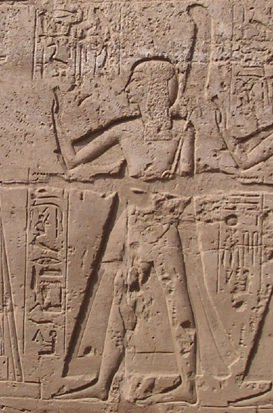 Relief représentant le prince Amonherkhépechef lors de l'inauguration du grand pylône de Ramsès II au temple de Louxor - XIXe dynastie égyptienne